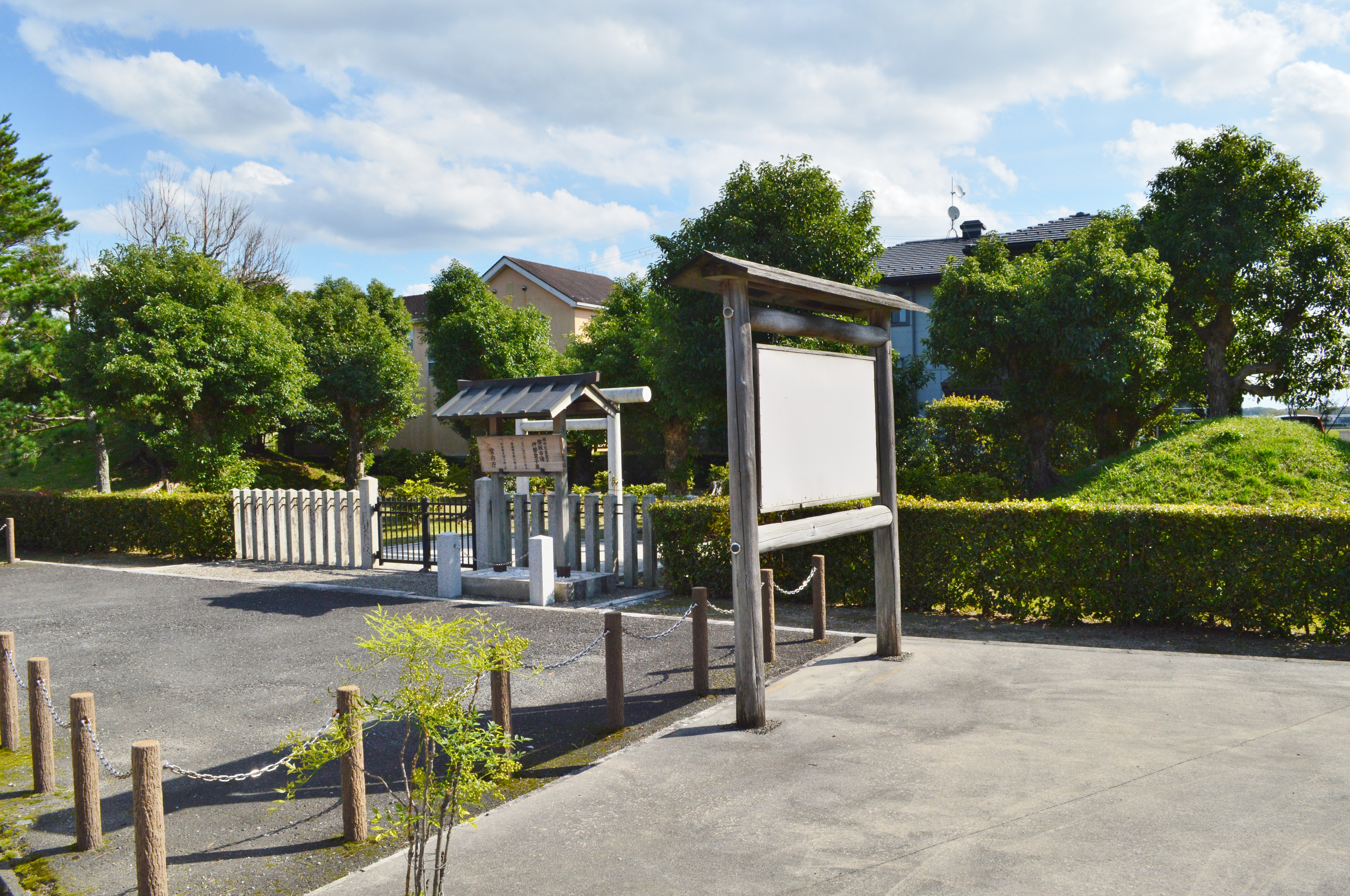 磐坂市辺押磐皇子墓 全景